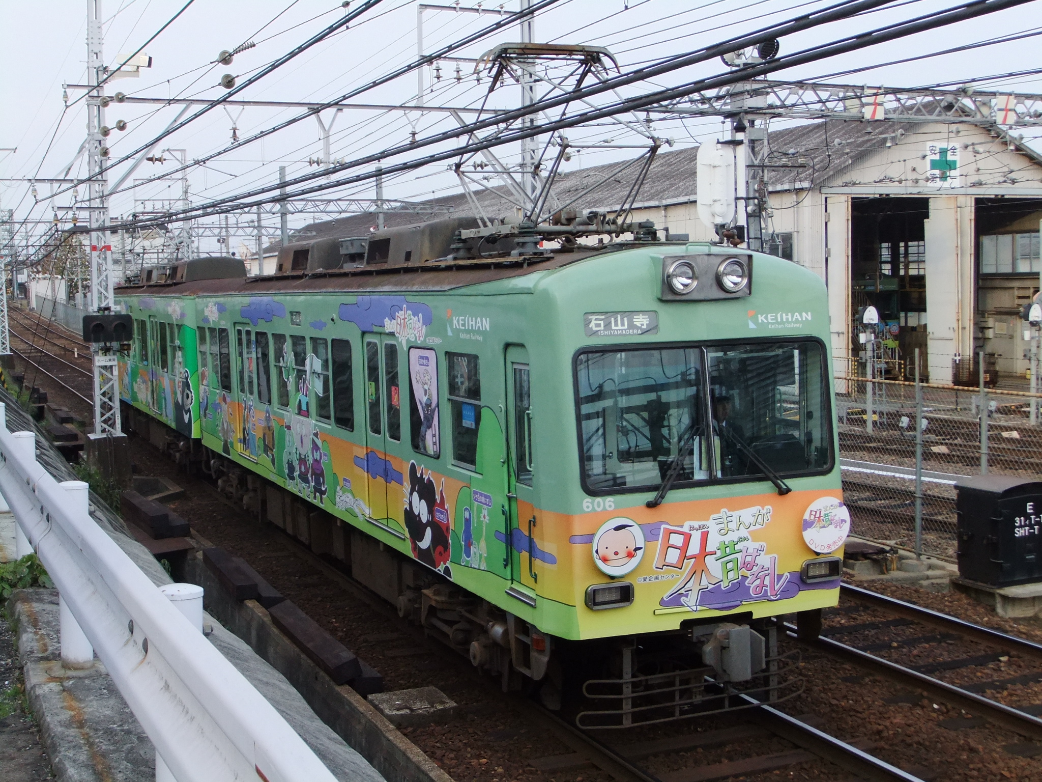 京阪600形605F まんが日本昔ばなしラッピング